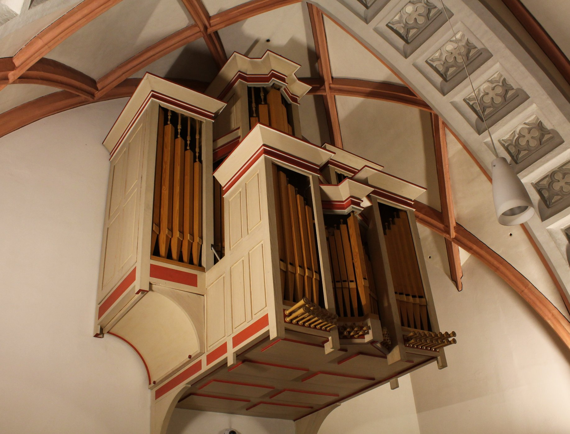 Orgel der Sakramentskapelle der Frauenkirche in München. (1985, G. Jann, II/11)